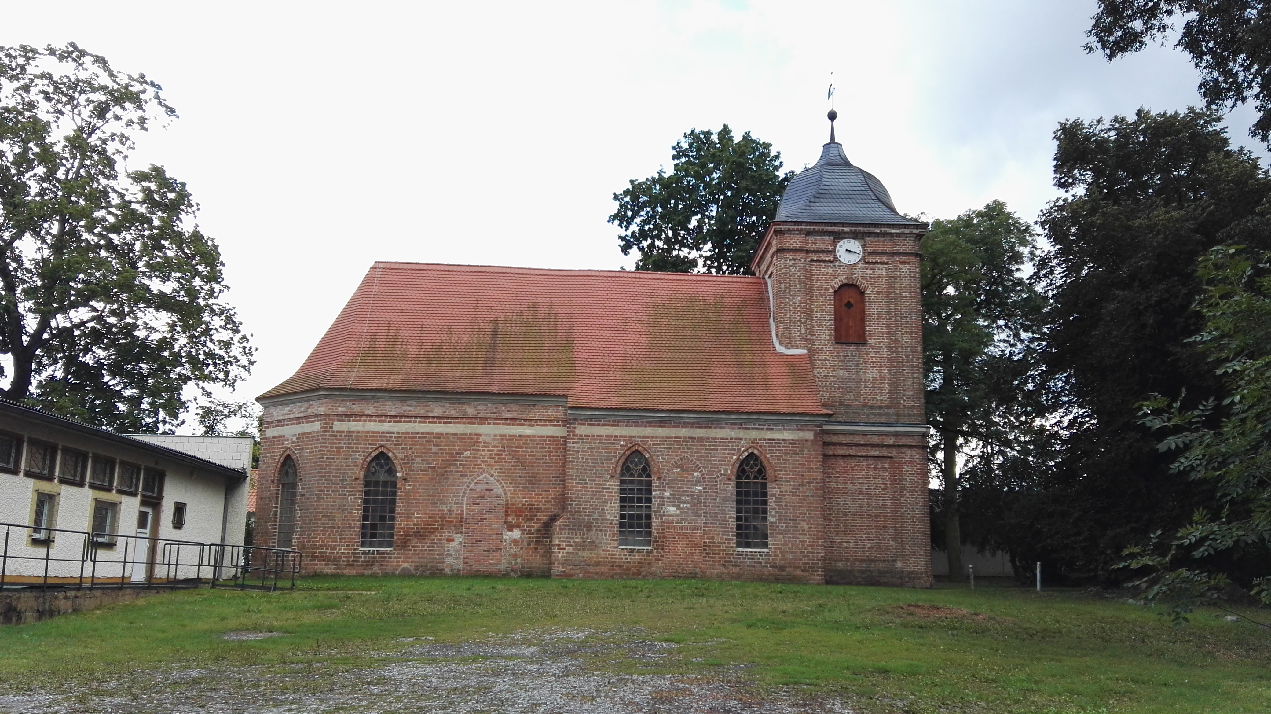 St. Nikolaikirche Selbelang